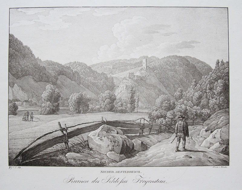 Alte Ansicht der Burgruine Freyenstein in Niederösterreich